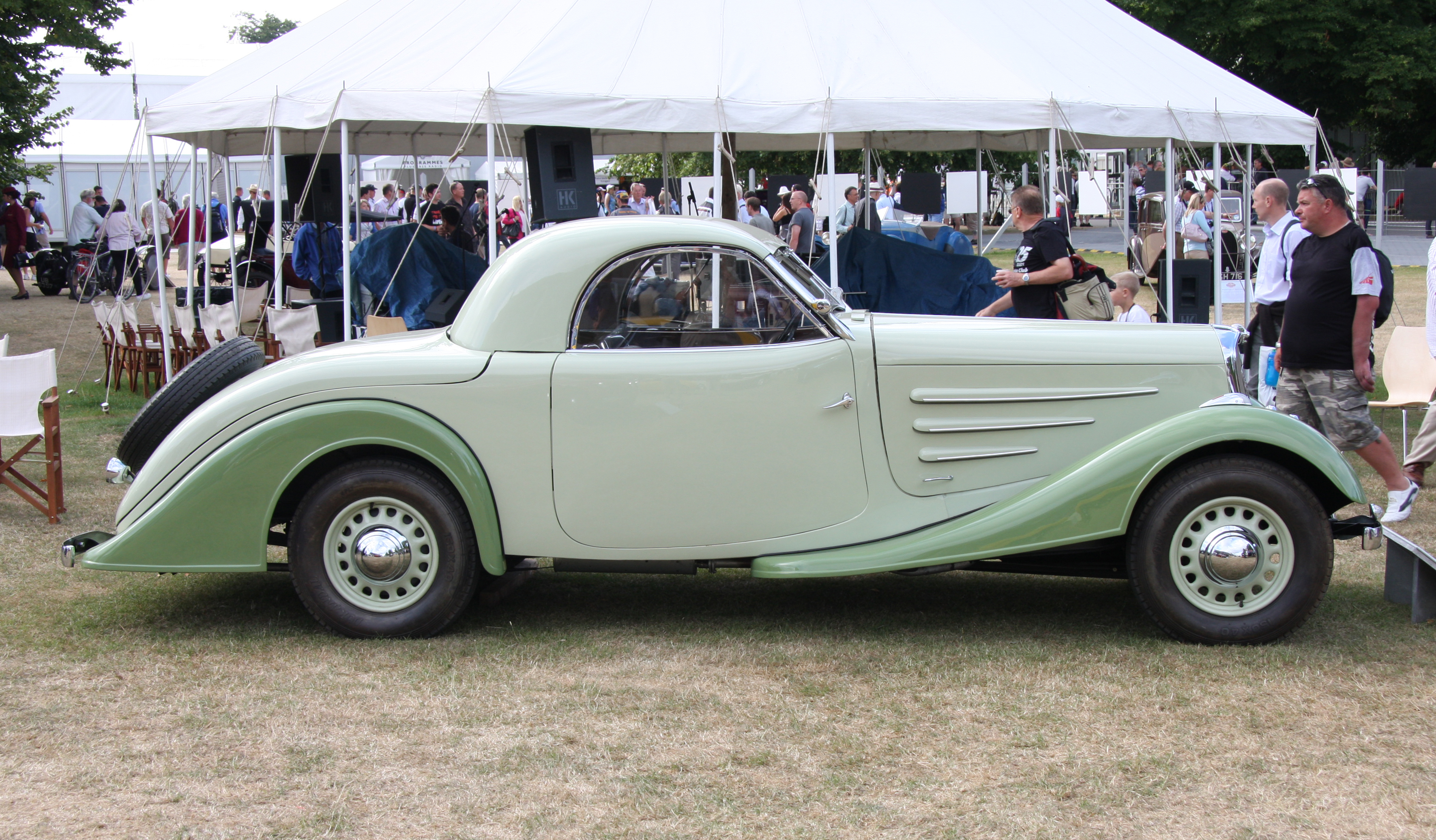 1934 Peugeot 601D Eclipse